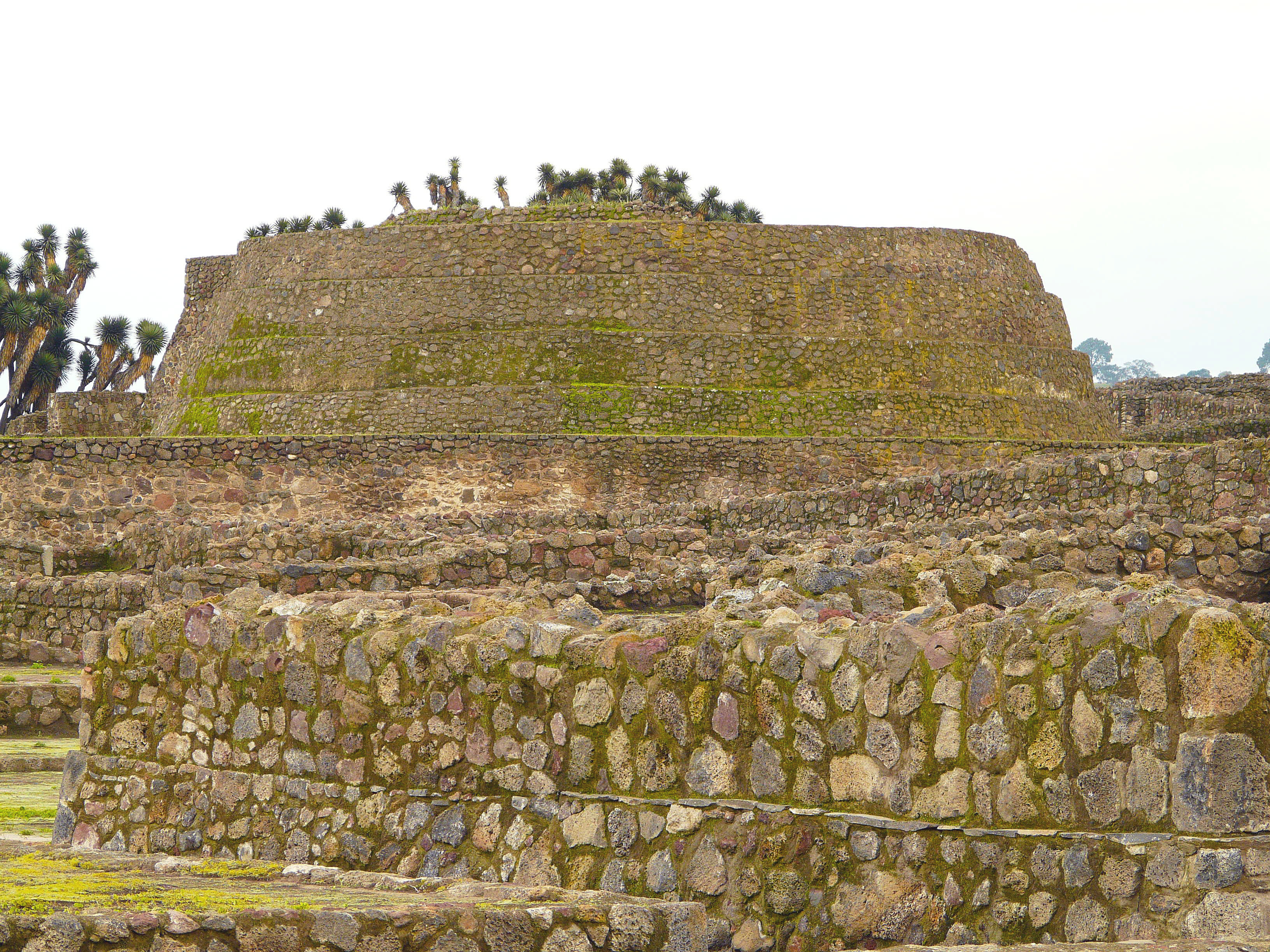 Calpulalpan, Tlaxcala